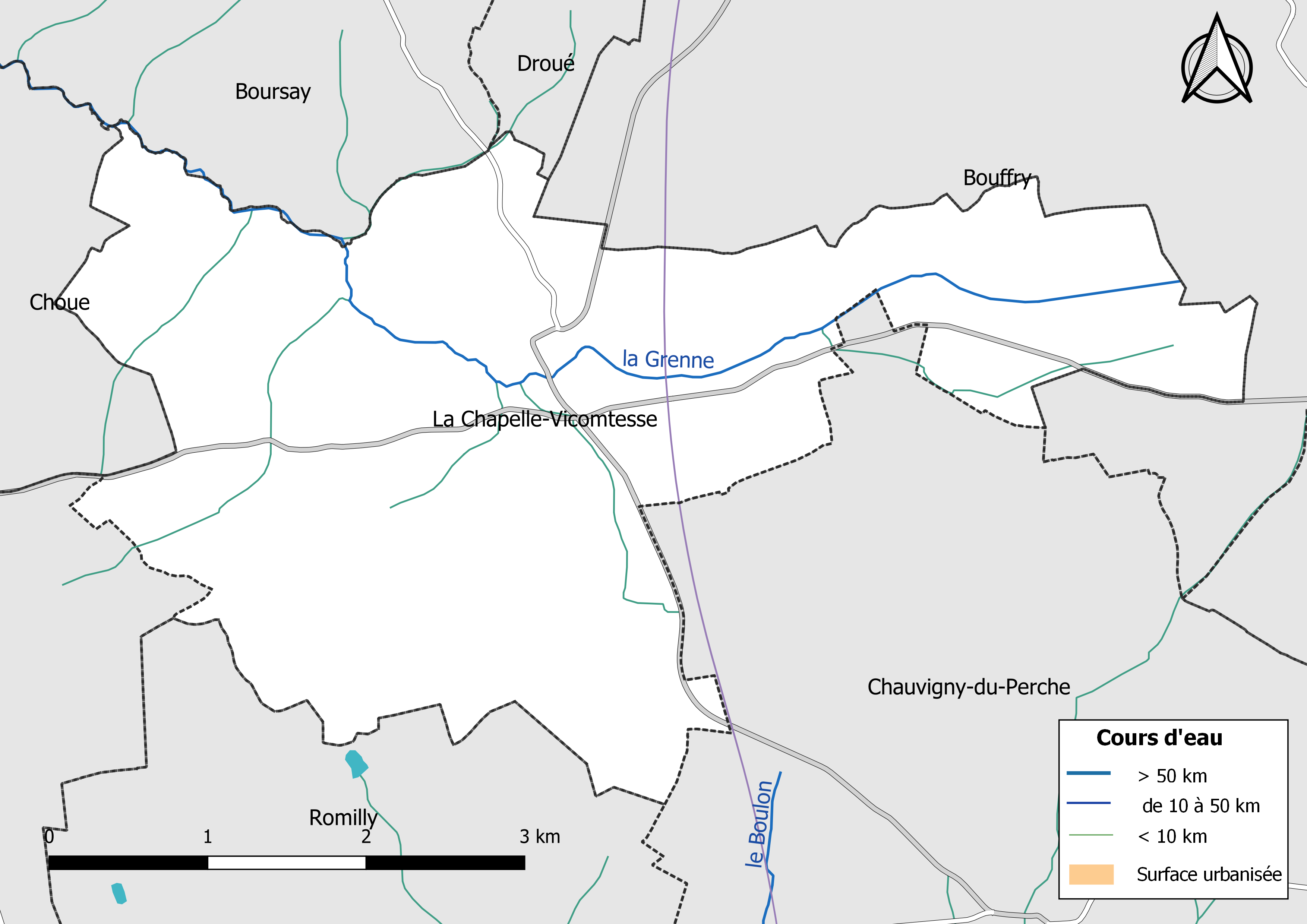 Carte du réseau hydrographique de la commune de La Chapelle-Vicomtesse (Loir-et-Cher, France).